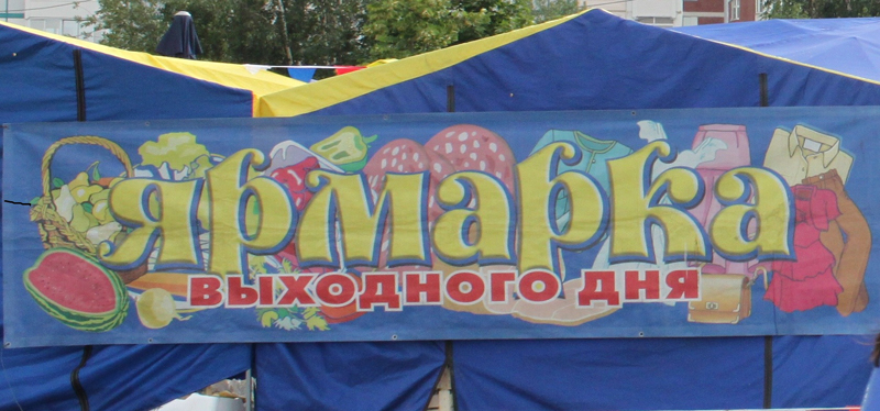 Ярмарка выходного дня